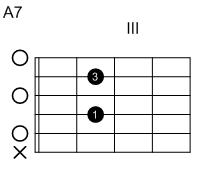 Eigenanfertigung